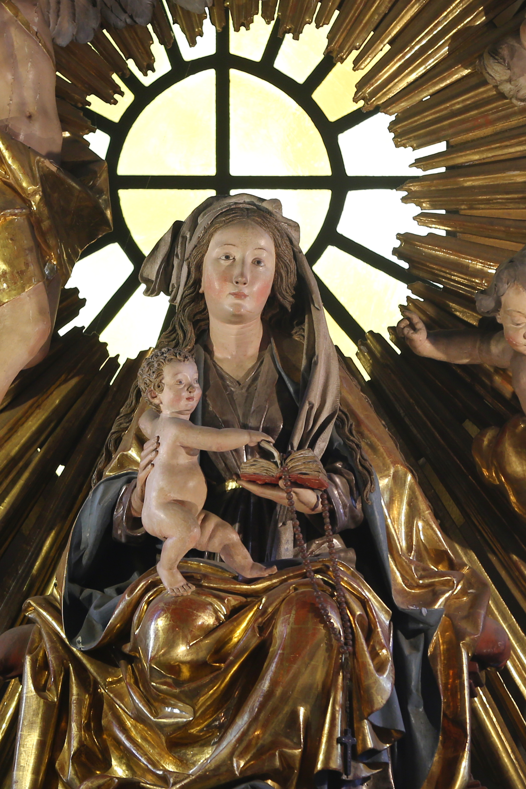 St. Maria Thalkirchen Gnadenbild der Madonna mit dem Kinde von Michel Erhart, 1482